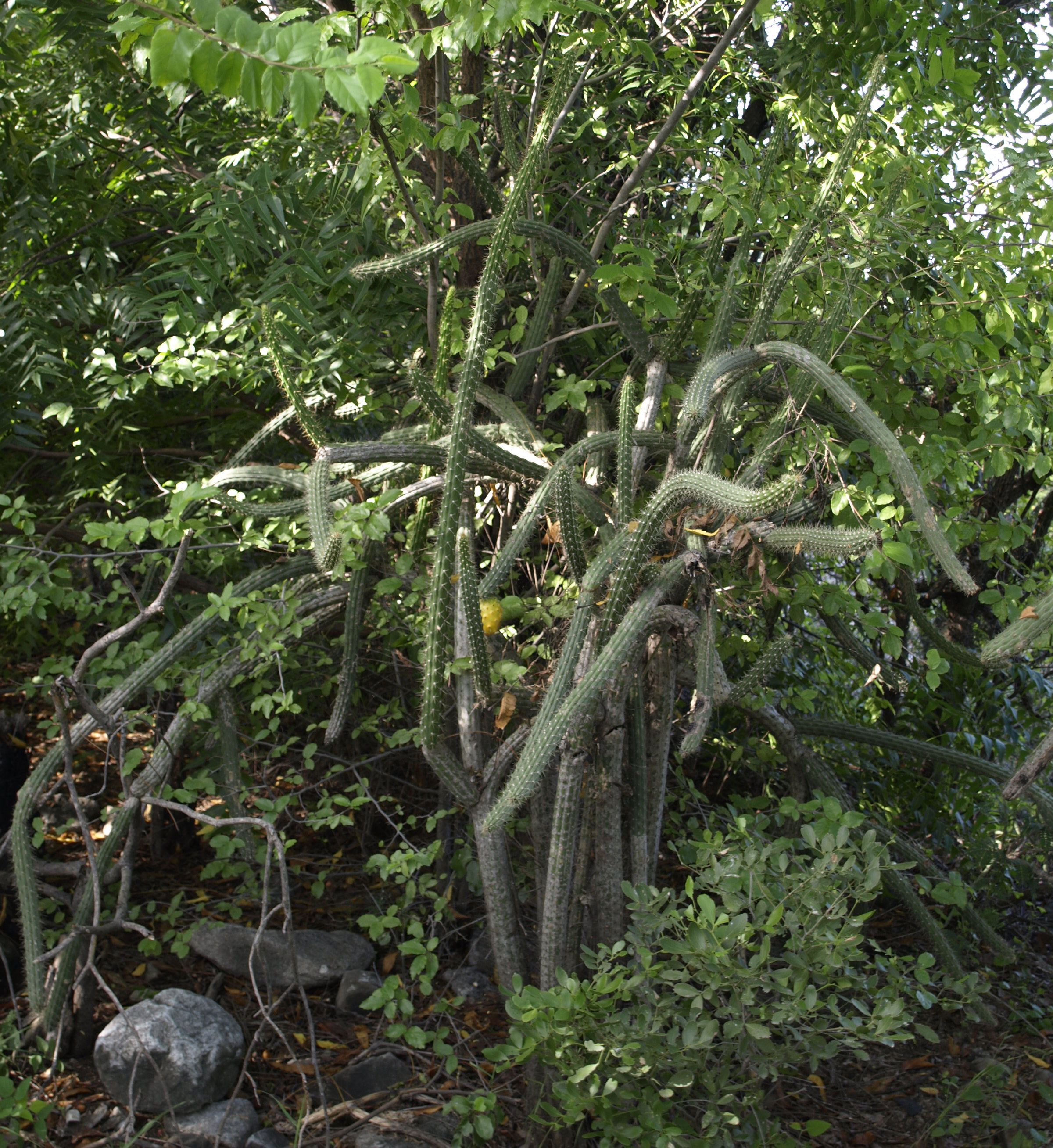 Harrisia divaricata, Hattillo, Prov. Azua, Dominican Republic